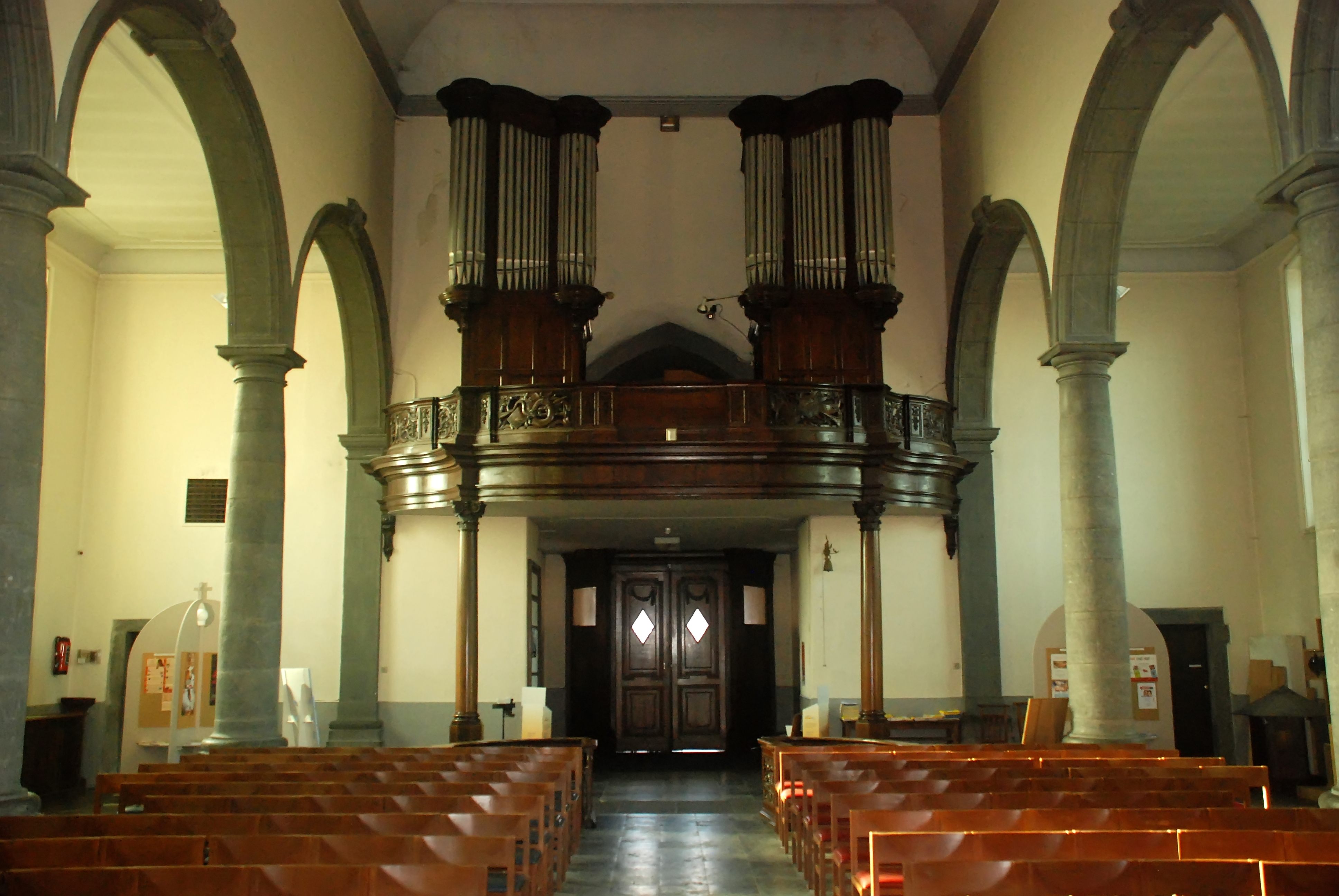 Belgique - Brabant wallon - Église de Court-Saint-Étienne